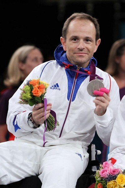 Aux Jeux Paralympiques de Londre 2012